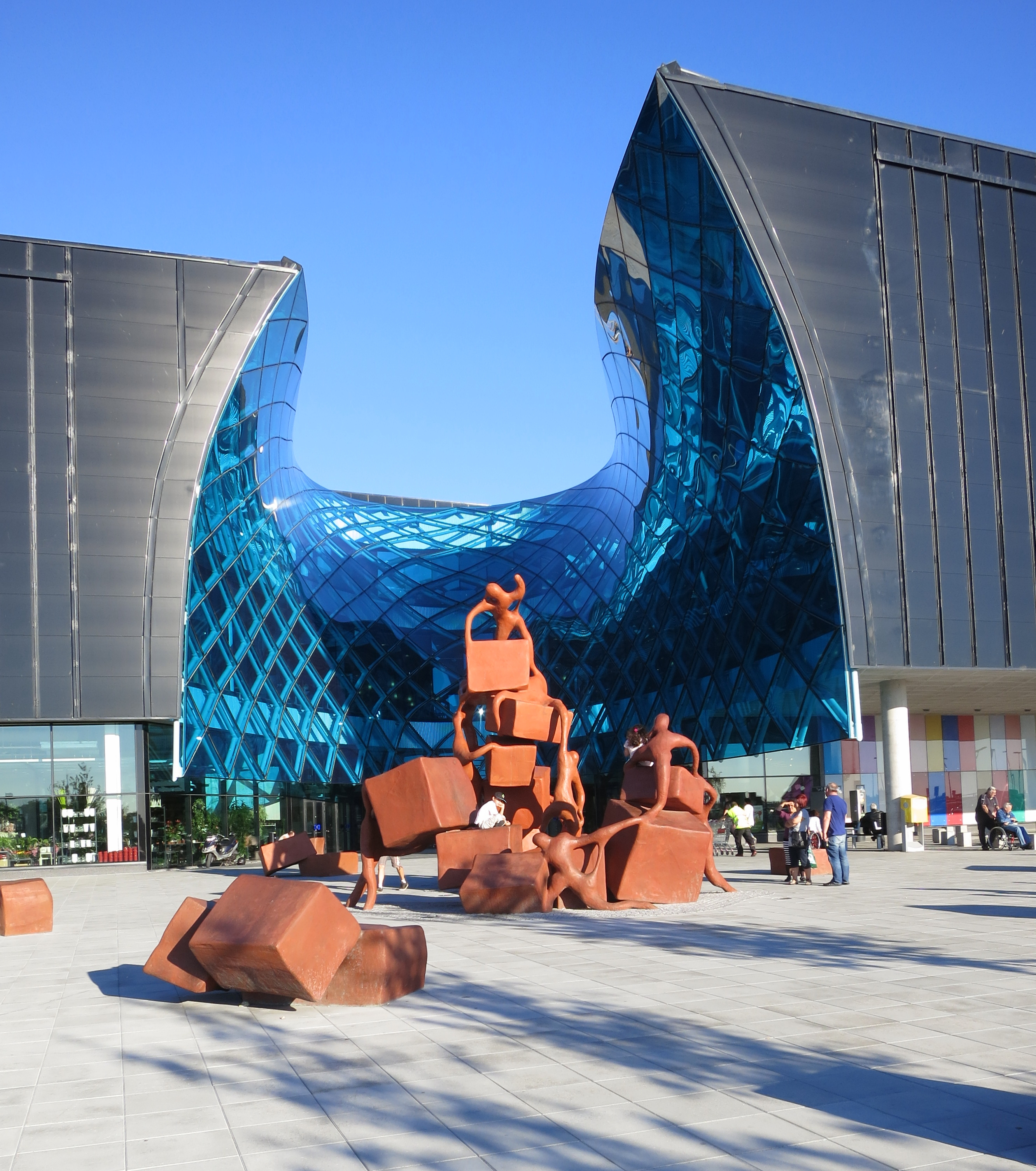 Emporia från väster